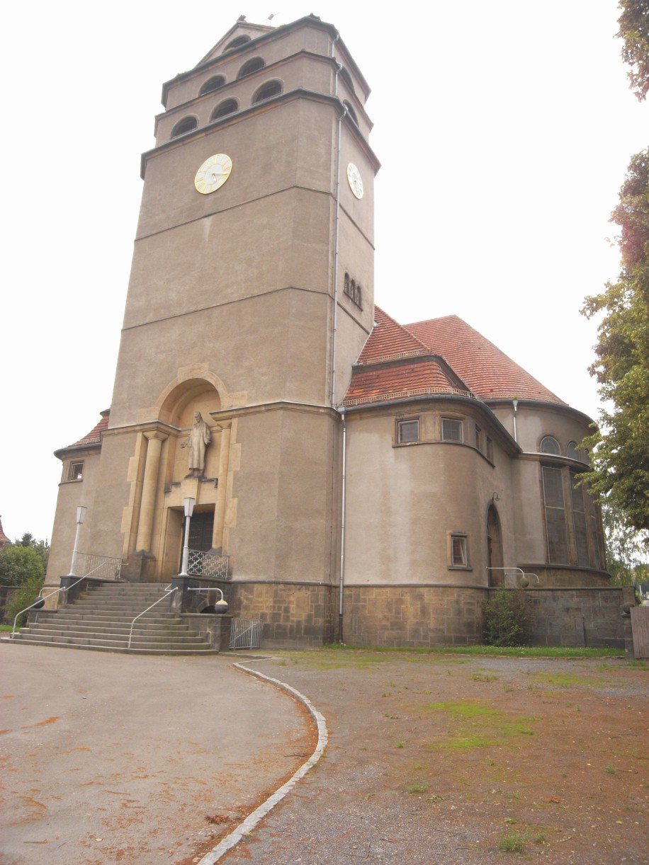 Heilandskirche in Dresden-Cotta (Sachsen, Deutschland)